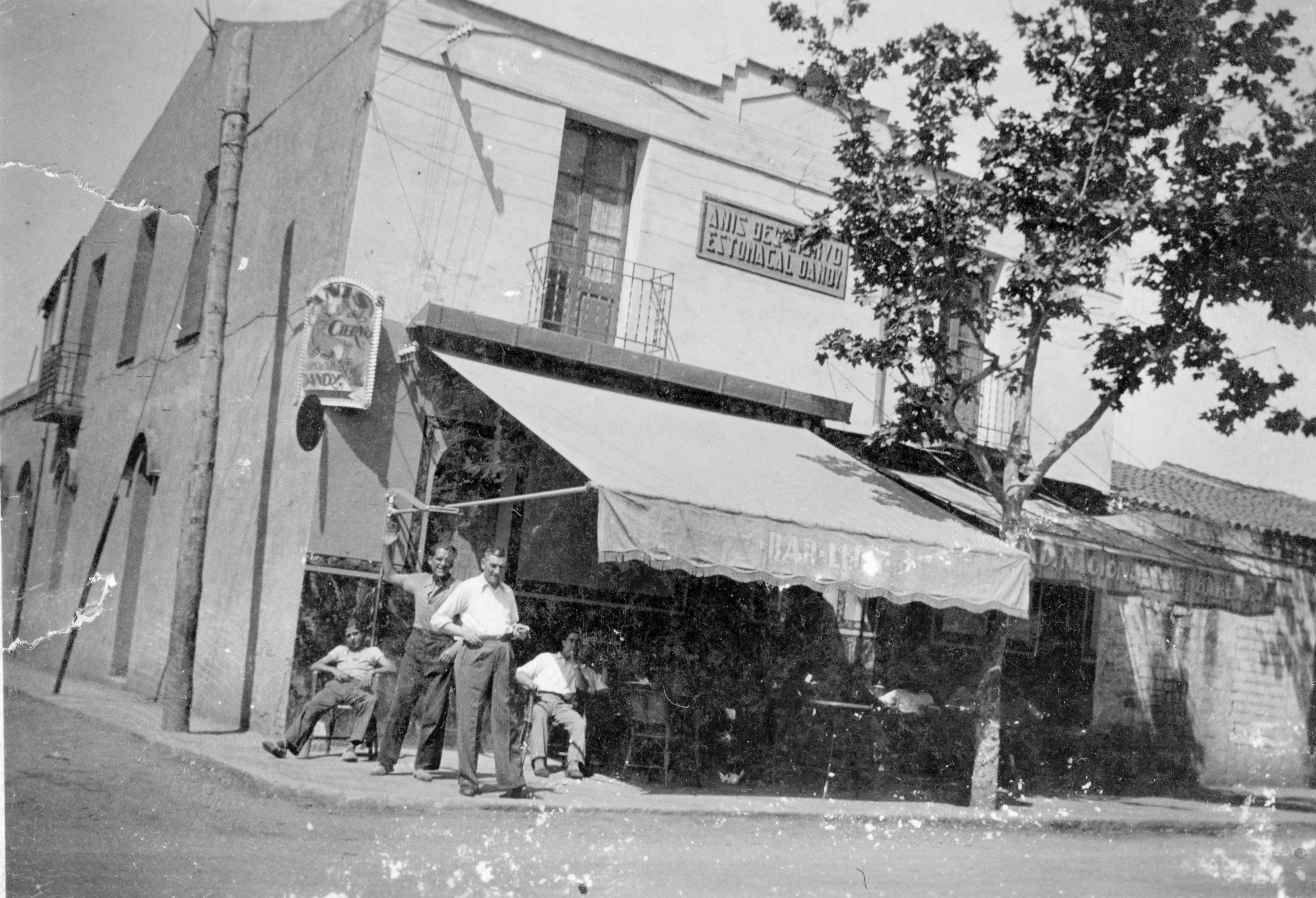 Bar "El Lliri", que estava situat a l'Avinguda del Primer de Maig, 50 (després Avinguda de la Creu, ara carretera de Barcelona, 558), a la Creu de Barberà. El pis de dalt fou el darrer domicili de la família Masachs Borruel de marxar a l'exili a França el febrer de 1939. Actualment aquest edifici ha desaparegut. Barberà del Vallès (ara Sabadell), 1936. Autor desconegut (AHS, cedida per Montserrat Masachs Masachs).